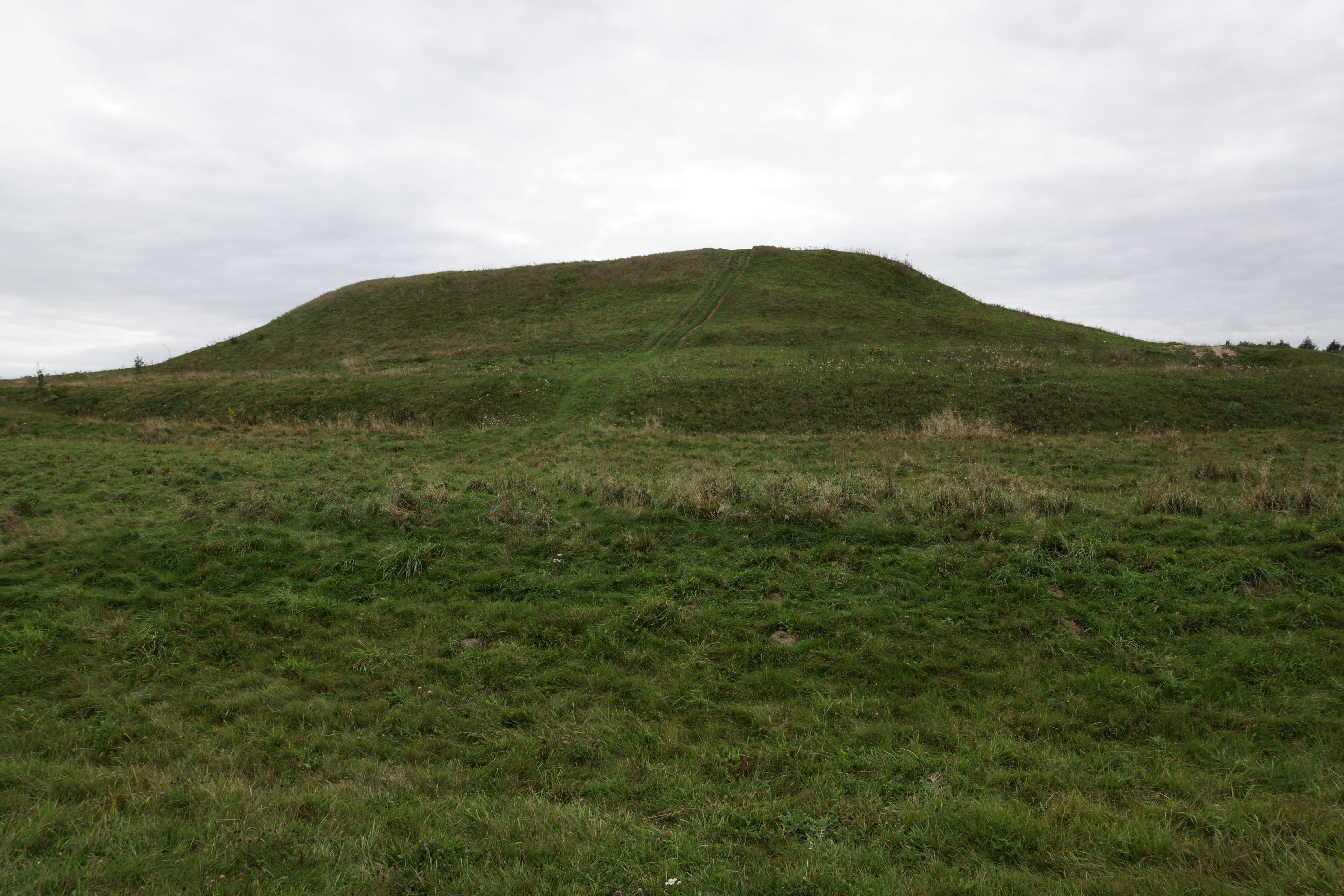 Беларуская (тарашкевіца): Гарадзішча пэрыяду раньняга феадалізму. Гарадзішча This is a photo of Belarusian heritage monument. Reference number: 113В000053 ( WLM)